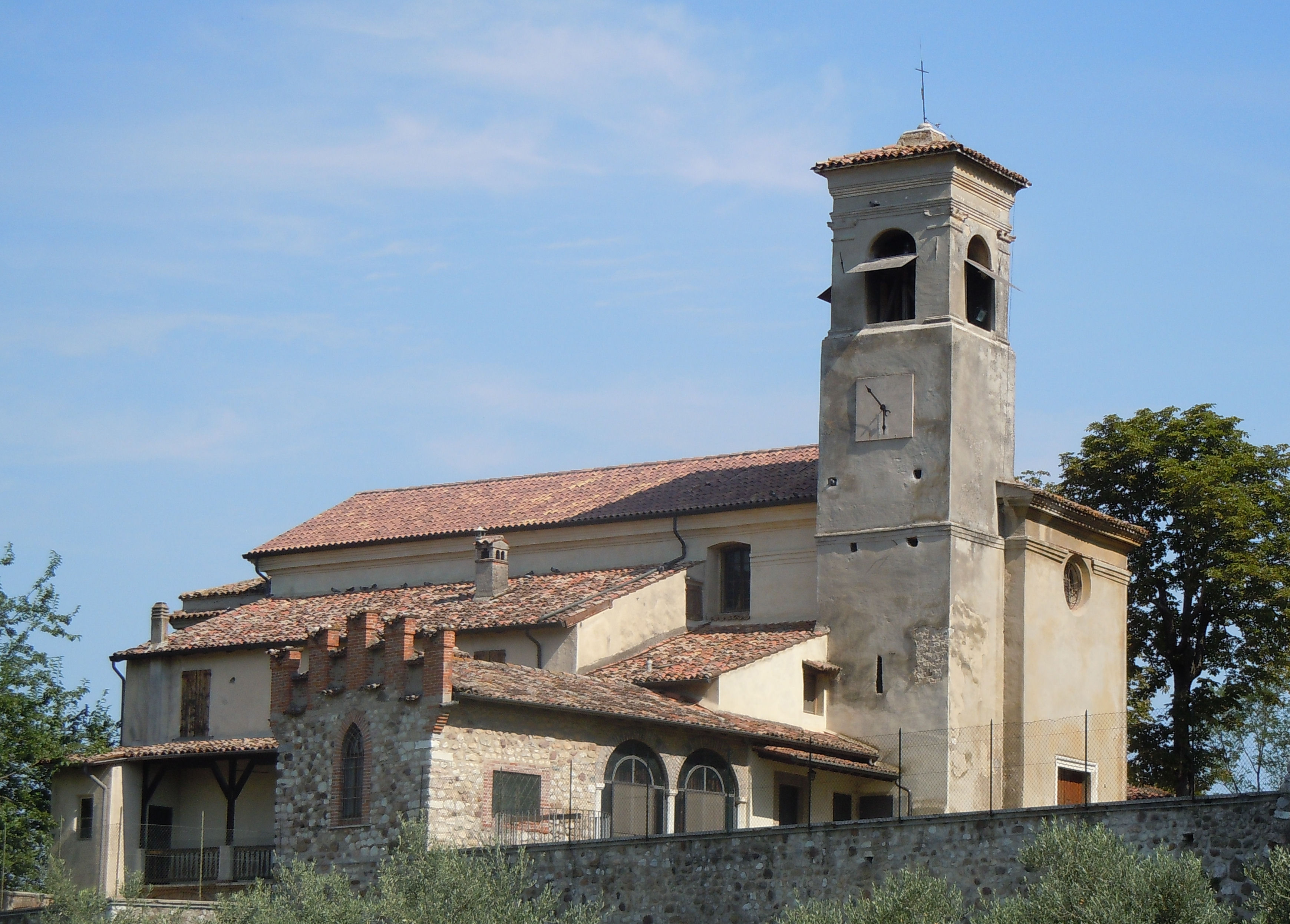 Lonato del Garda, chiesa di S. Michele, castello di Drugolo.